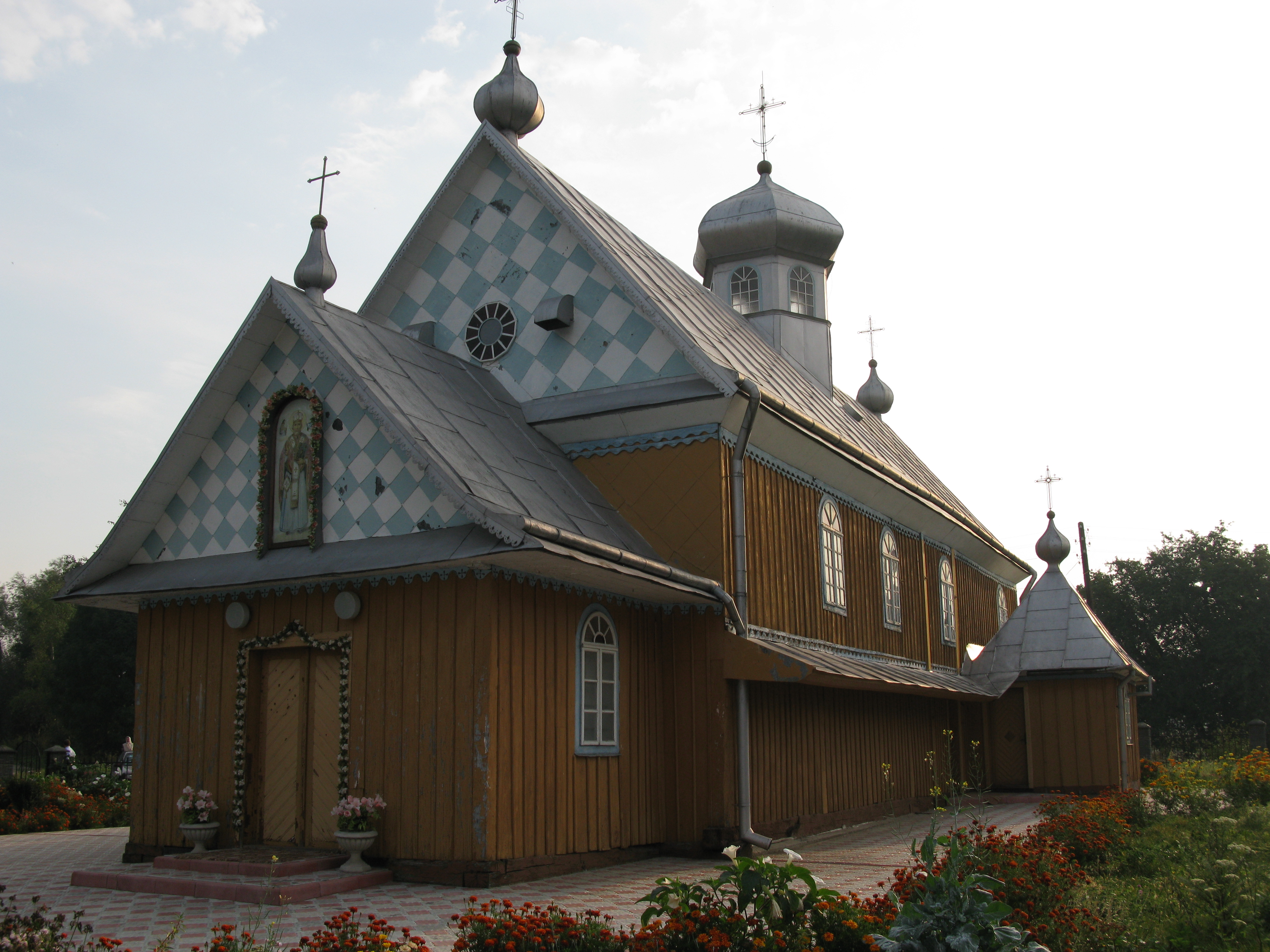 Церква св. Миколая у селі Буців, пам'ятка архітектури 1600 р.